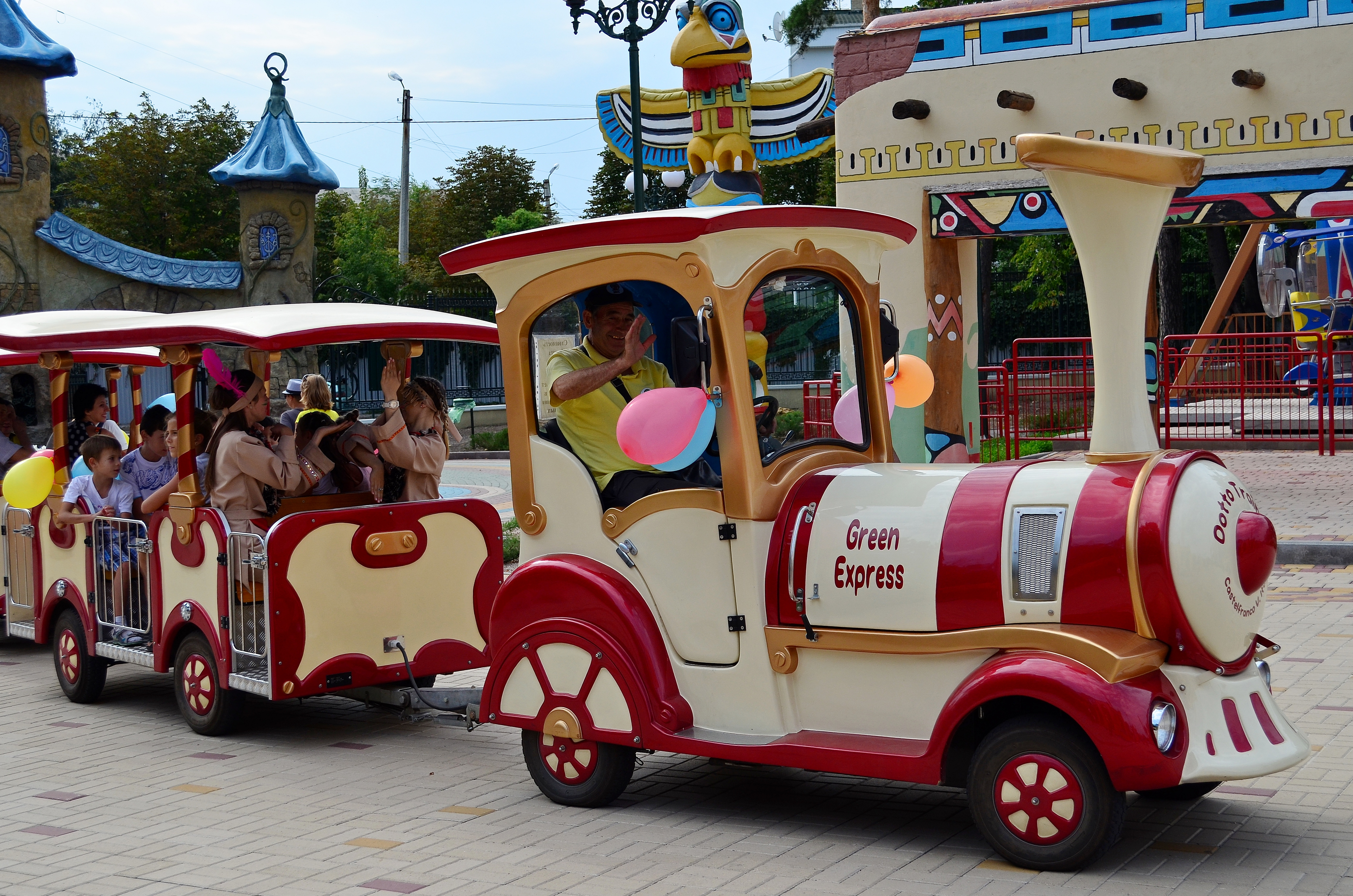 Парковый паровозик